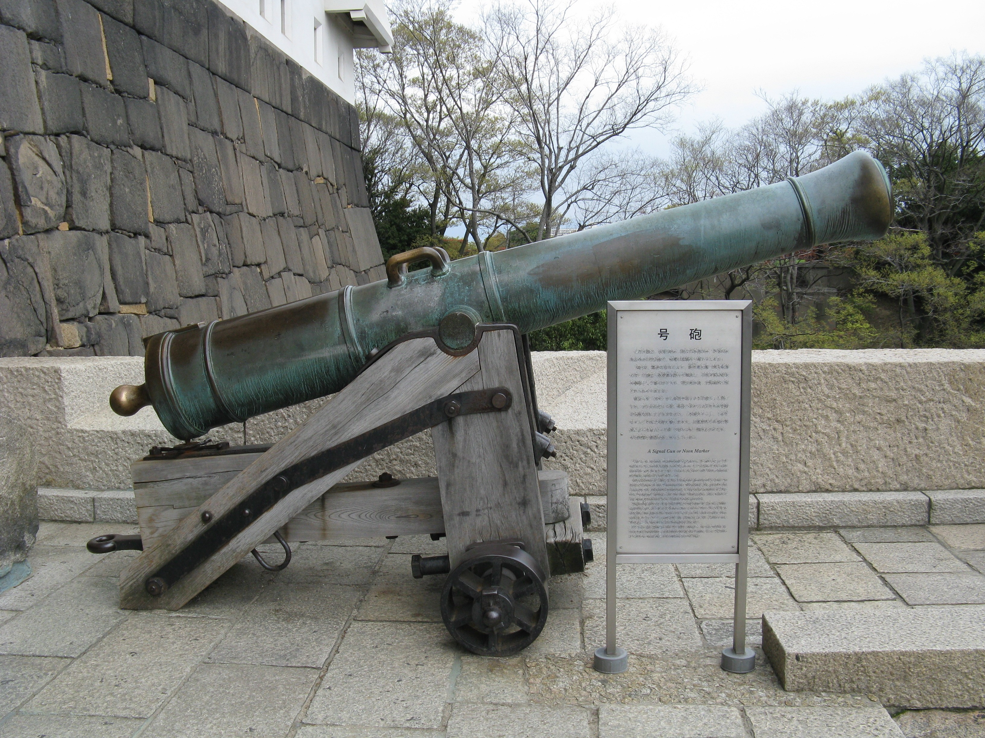 大阪城の号砲。